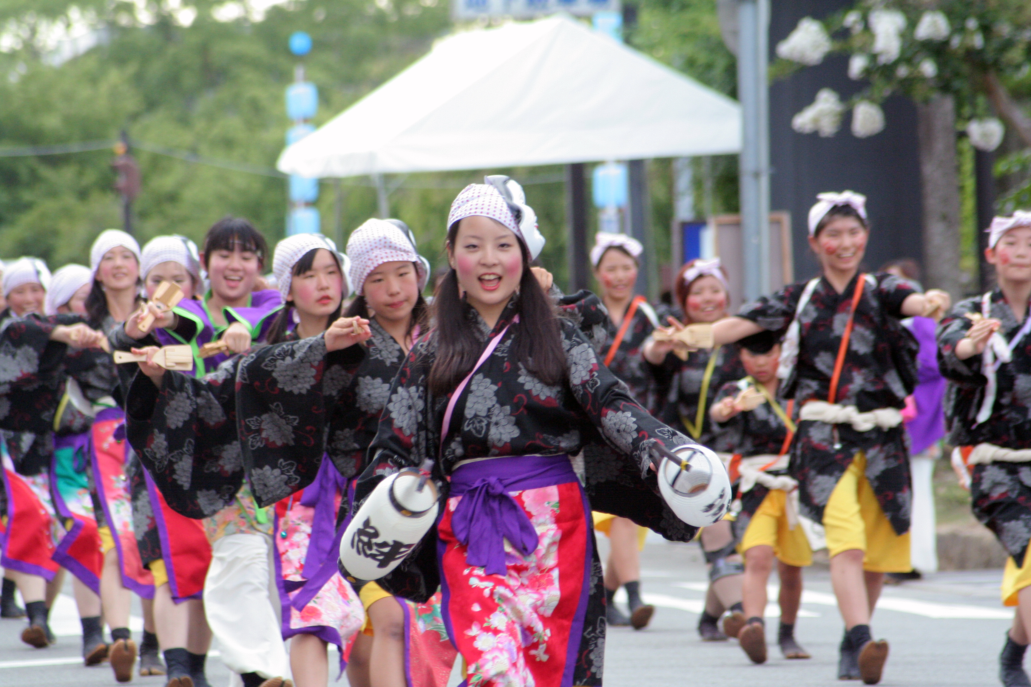 2012年8月4日・5日に兵庫県姫路市姫路城南の大手前公園及び御幸通りにて開催された第13回ひめじ良さ恋まつりの様子。